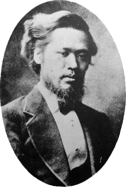 Mori Arinori 森有礼